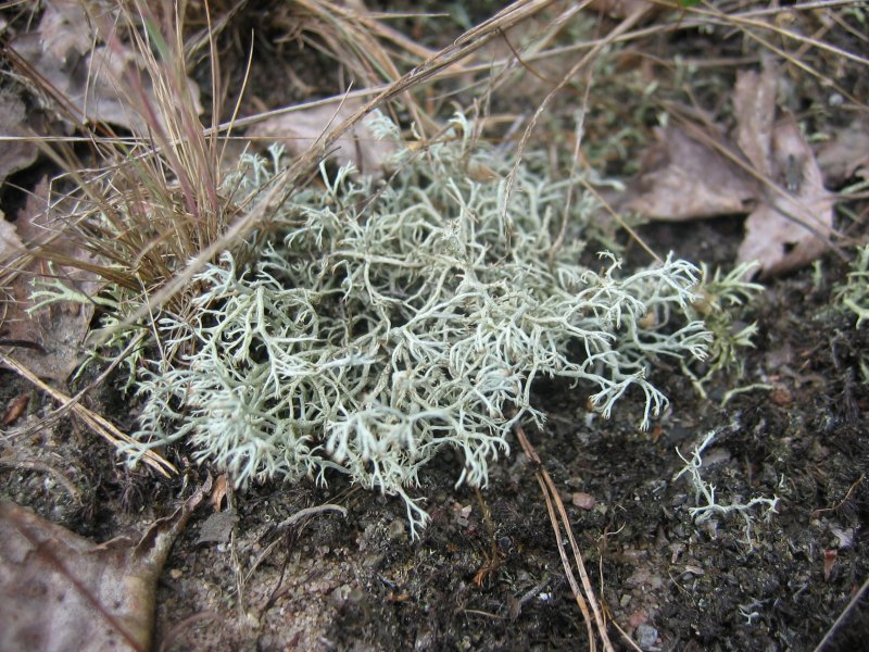 Echte Rentierflechte Cladonia rangiferina in der Pflanzengesellschaft Corynephorion canescentis, Müritz-Gebiet